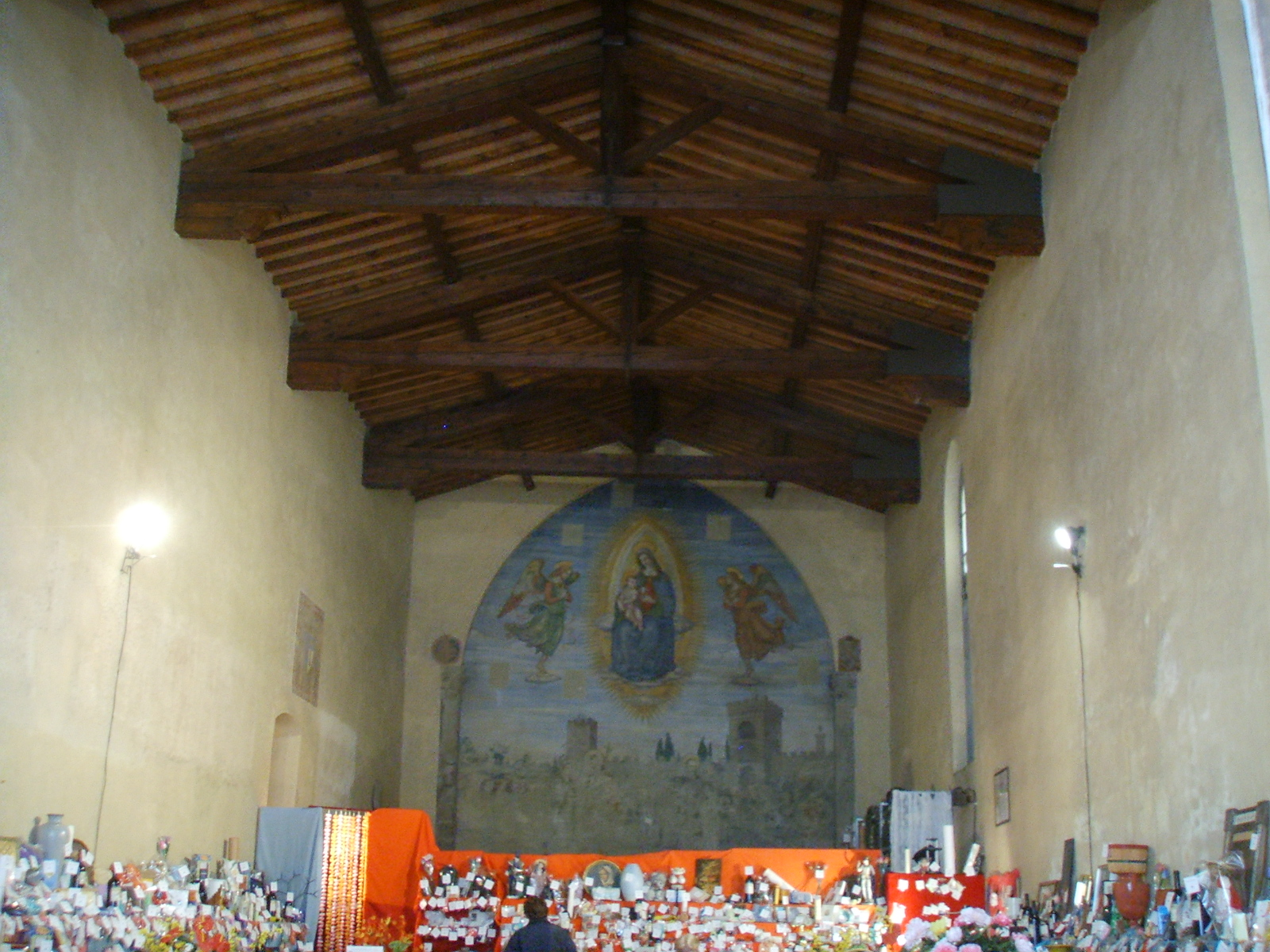 Santa Maria Vergine della Croce al Tempio, interno, affreschi di bicci di lorenzo e stefano d'antonio